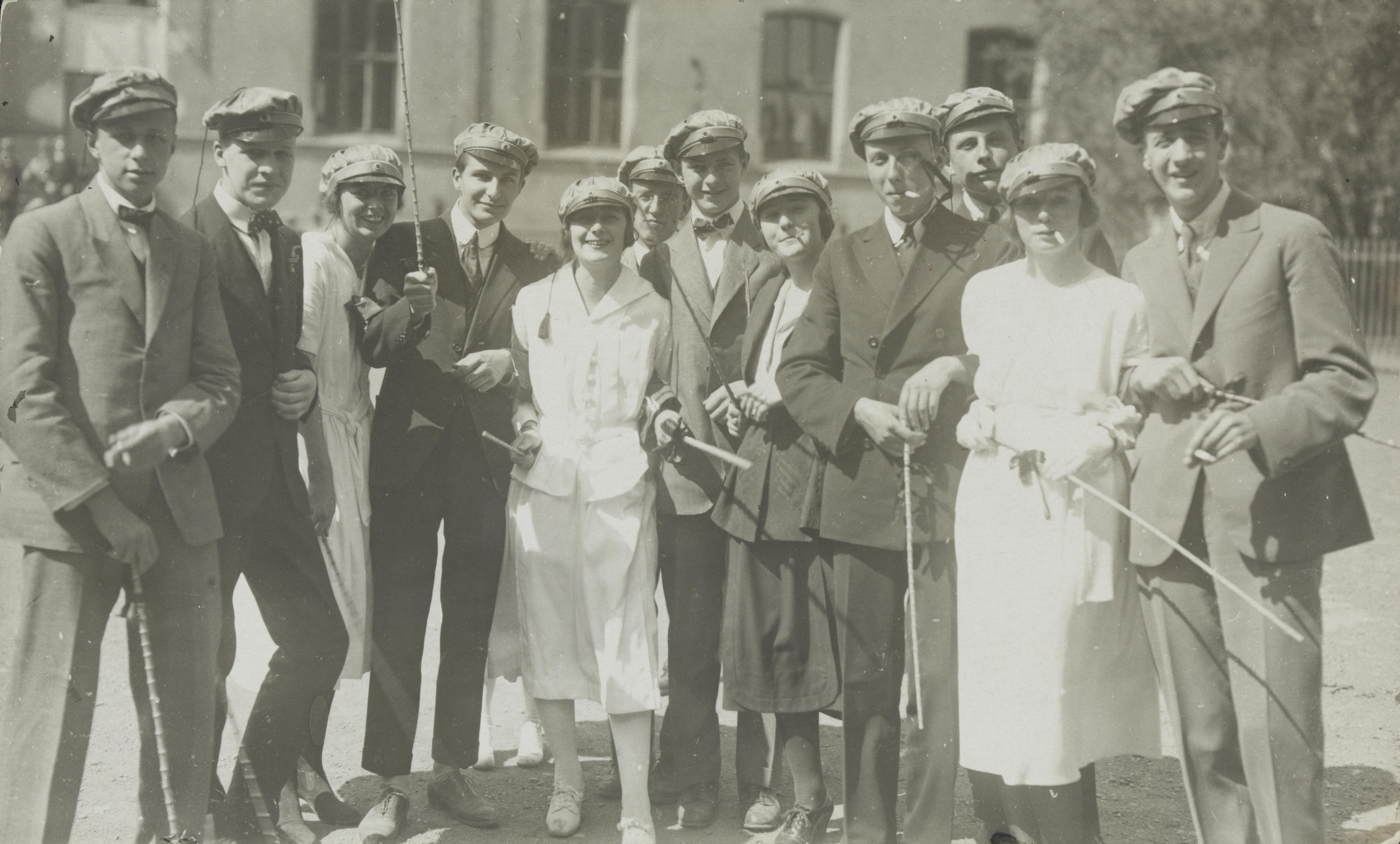 Bildet er hentet fra Nasjonalbibliotekets bildesamling